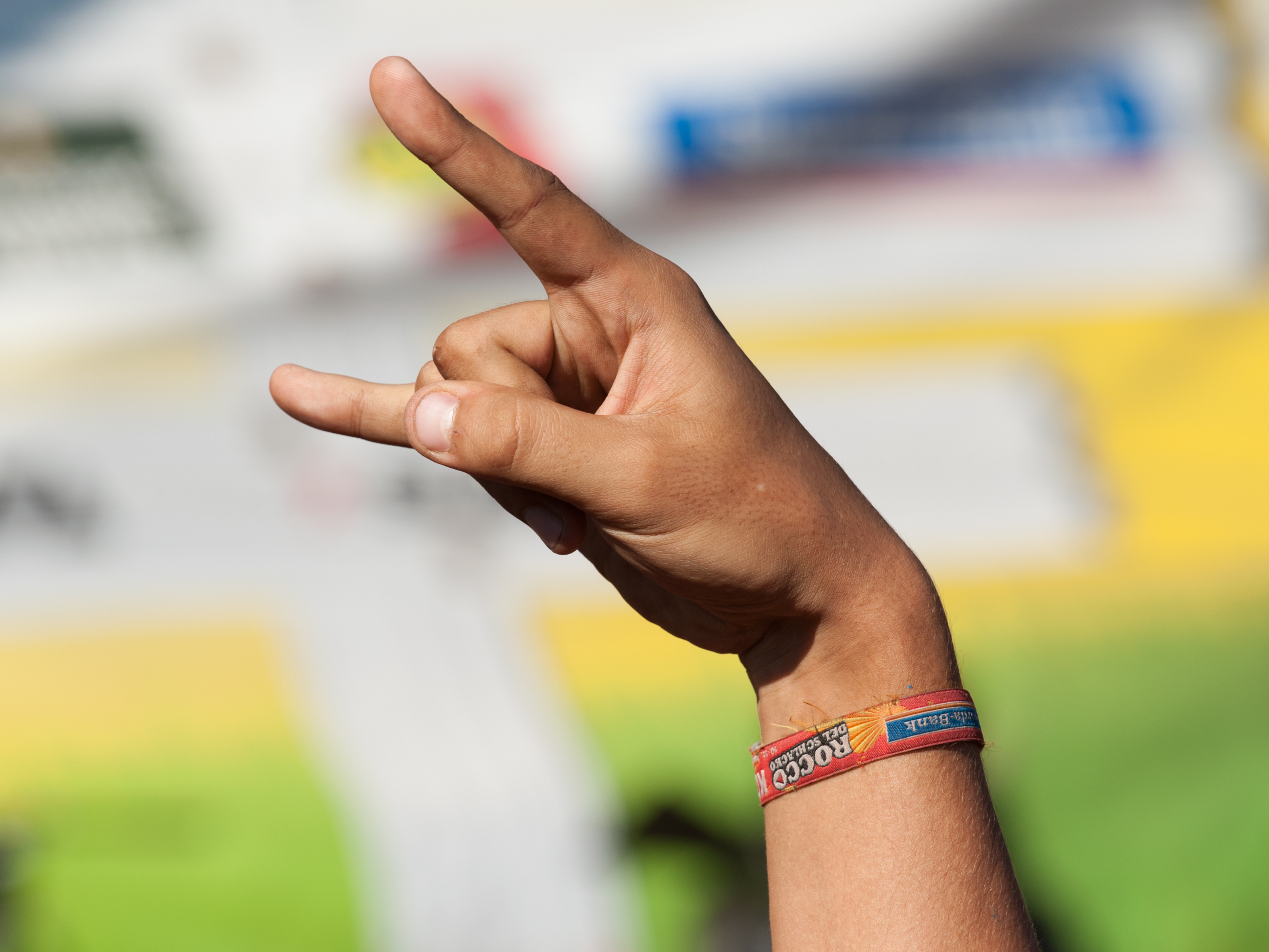 "Devil Horns" beim Festival Rocco del Schlacko 2012.